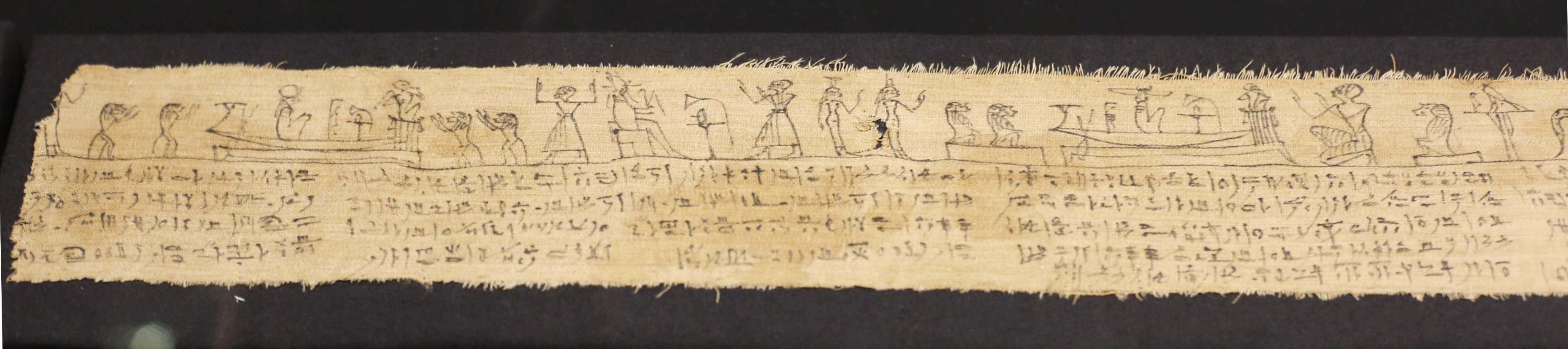 Bandelette du livre des morts de Neferiou au musée Champollion de Figeac.